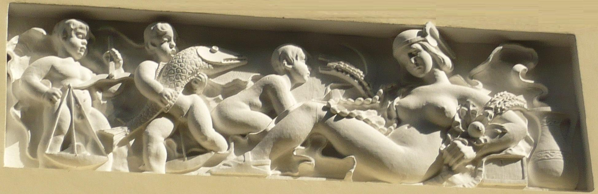 Lwów. Płaskorzeźby na pawilonie w Parku Stryjskim